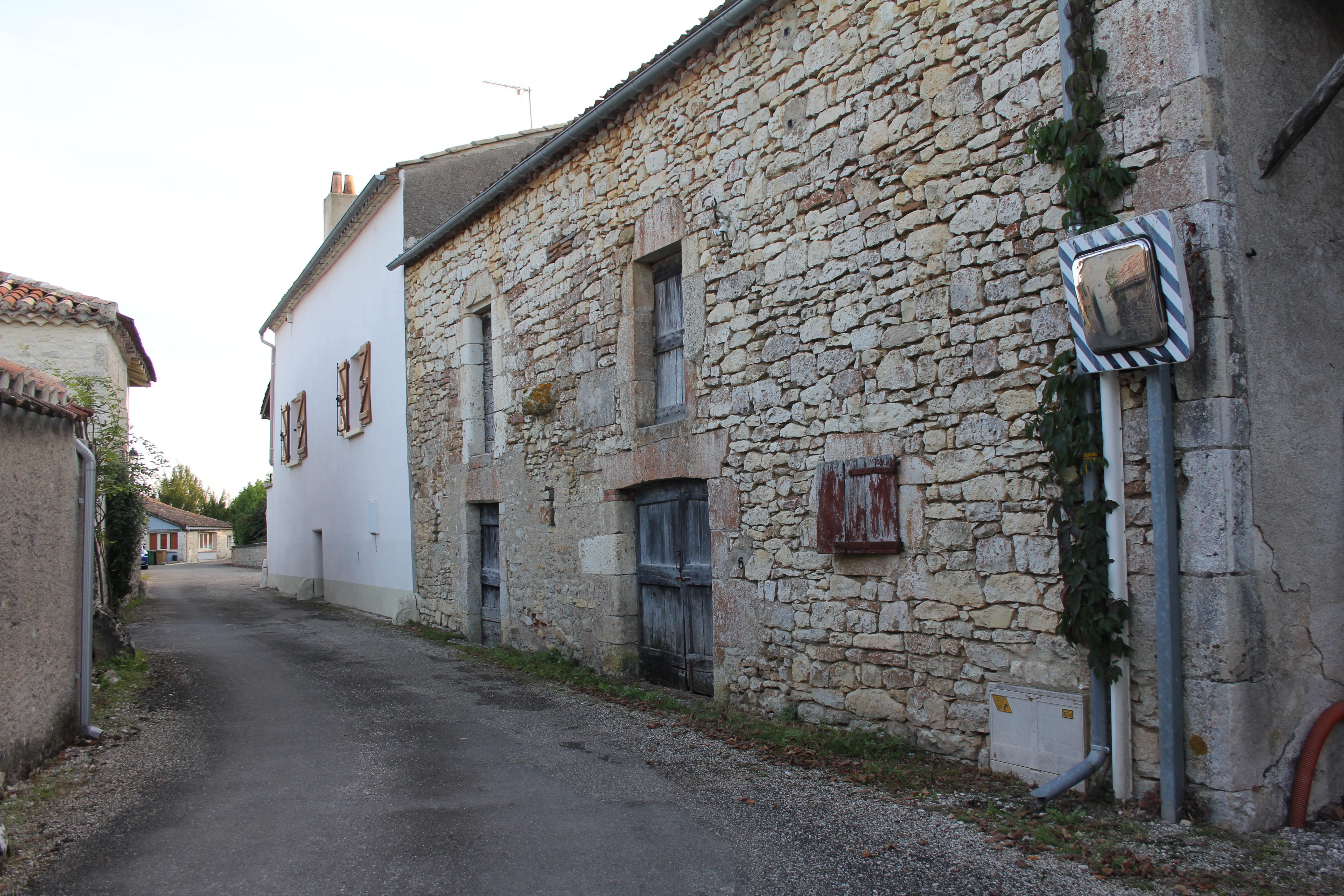 Plus ancienne maison du bourg du Montat-Lot-âge estimé:4 siècles.